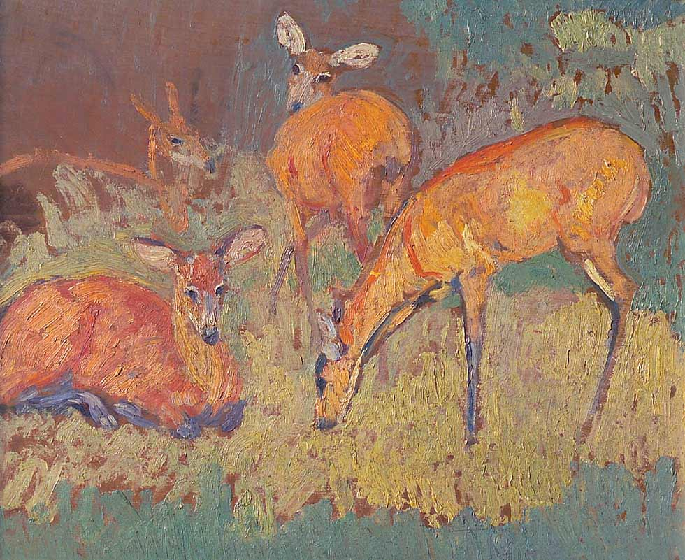 Obra del pintor uruguayo Pedro Blanes Viale (1879 - 1926) "Ciervos", óleo sobre tabla de 37,5 x 46 cm.